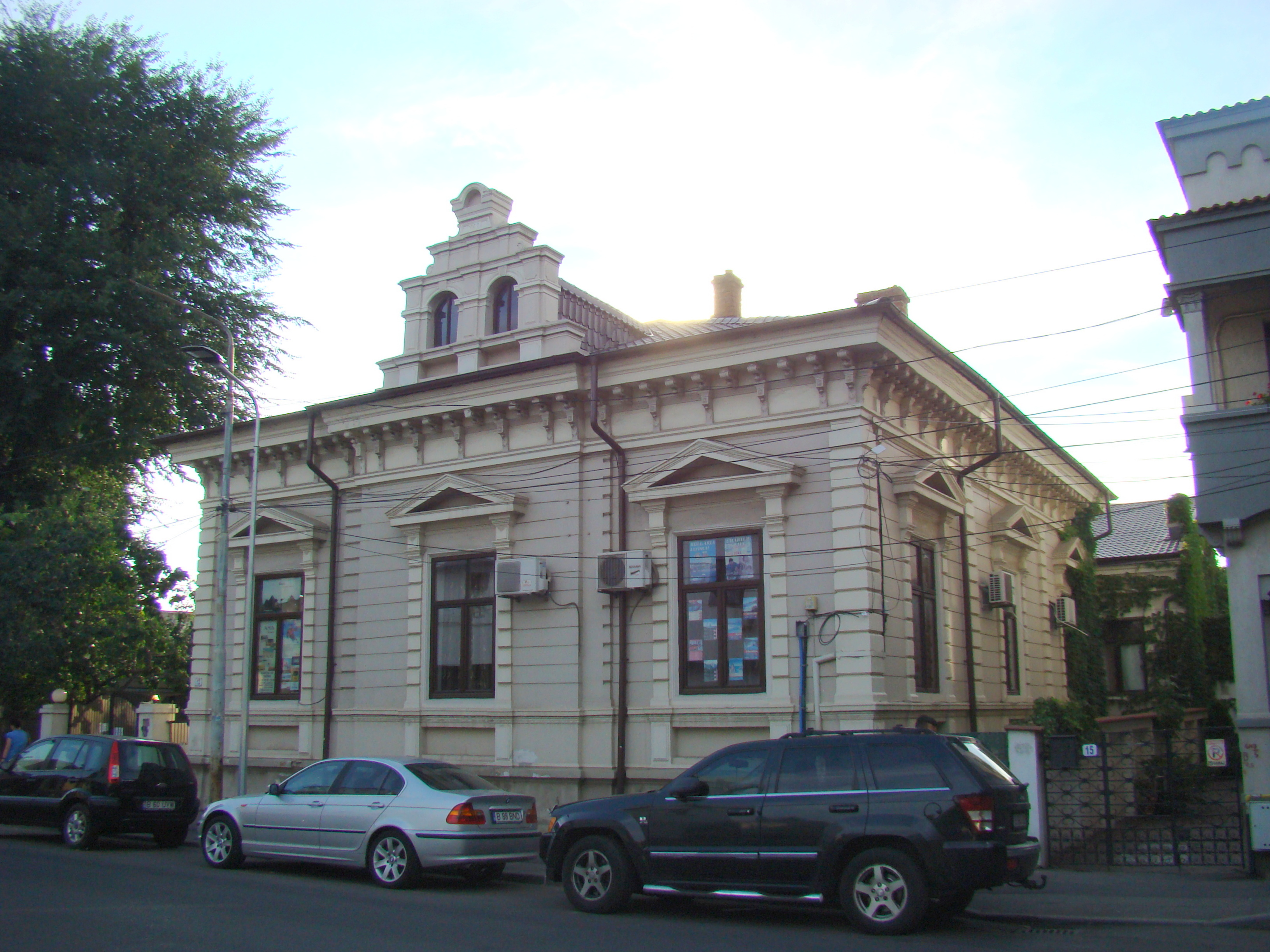 Clădire monument istoric, str. Paris, nr 13